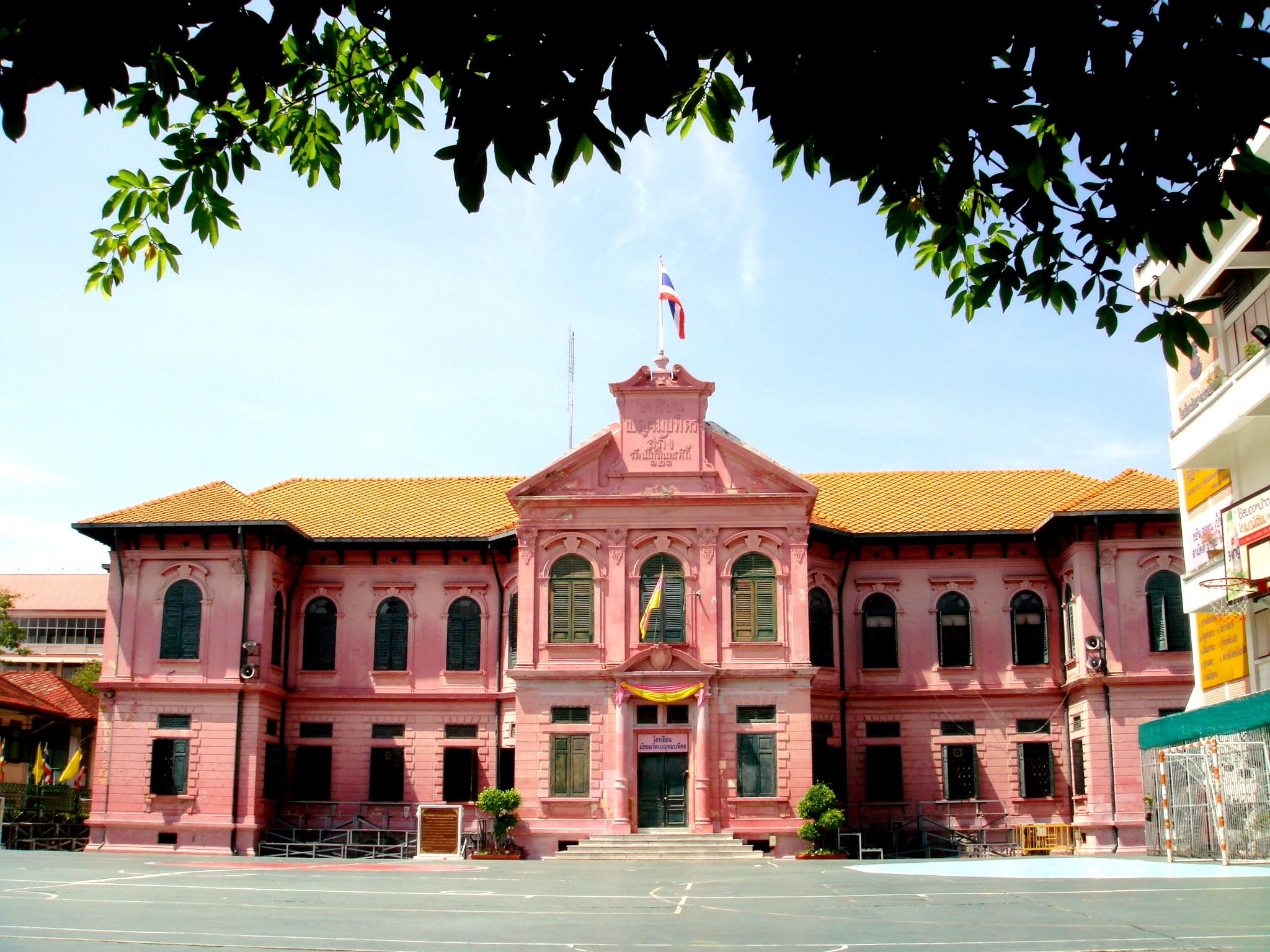 สนามโรงเรียนมัธยมวัดเบญจมบพิตร